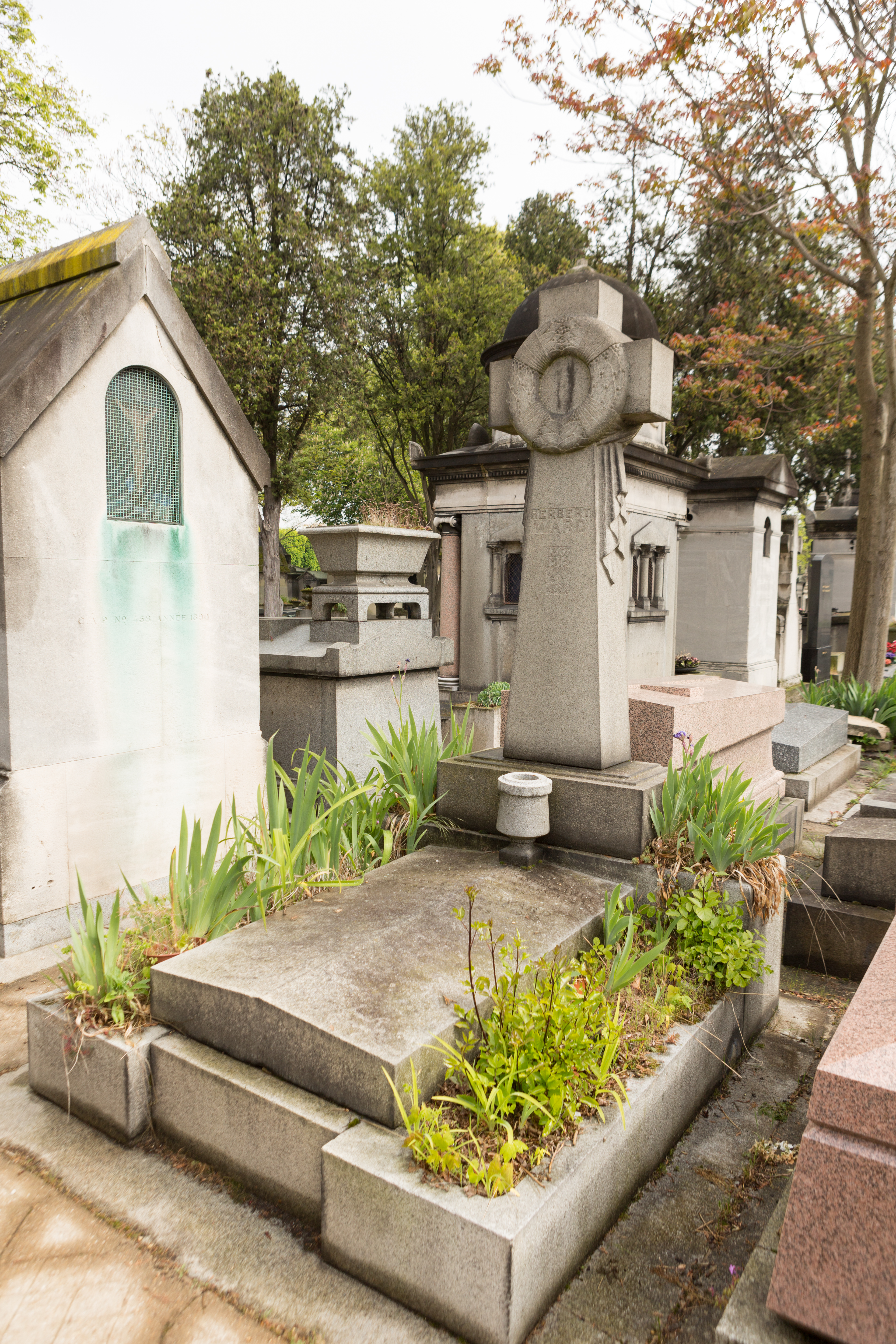 Sépulture d'Herbert Ward (1863-1919), sculpteur africaniste, illustrateur et explorateur anglais.